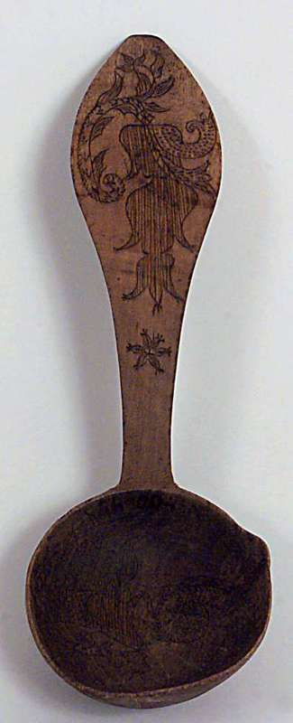 Øse mdatert 1828 fra Kråkstad, Ski i Akershus. Lengde 22,7 cm. Norsk Folkemuseum, NF.1897-0400.